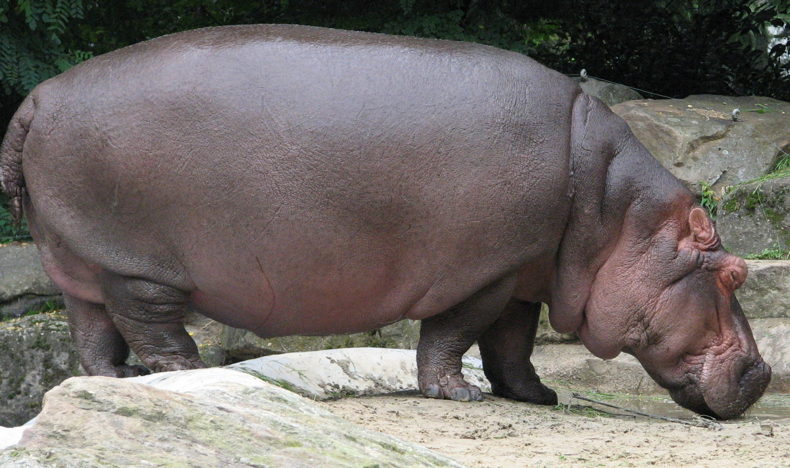 Seekoei.